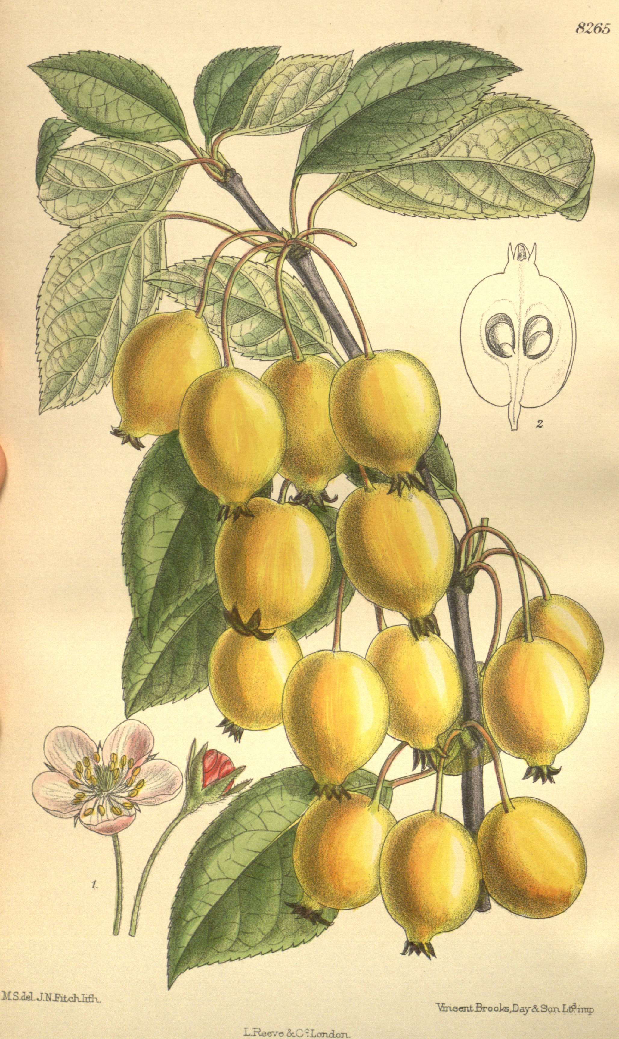 Pyrus ringo (= Malus × asiatica, ?= Malus prunifolia × Malus sieversii), Rosaceae